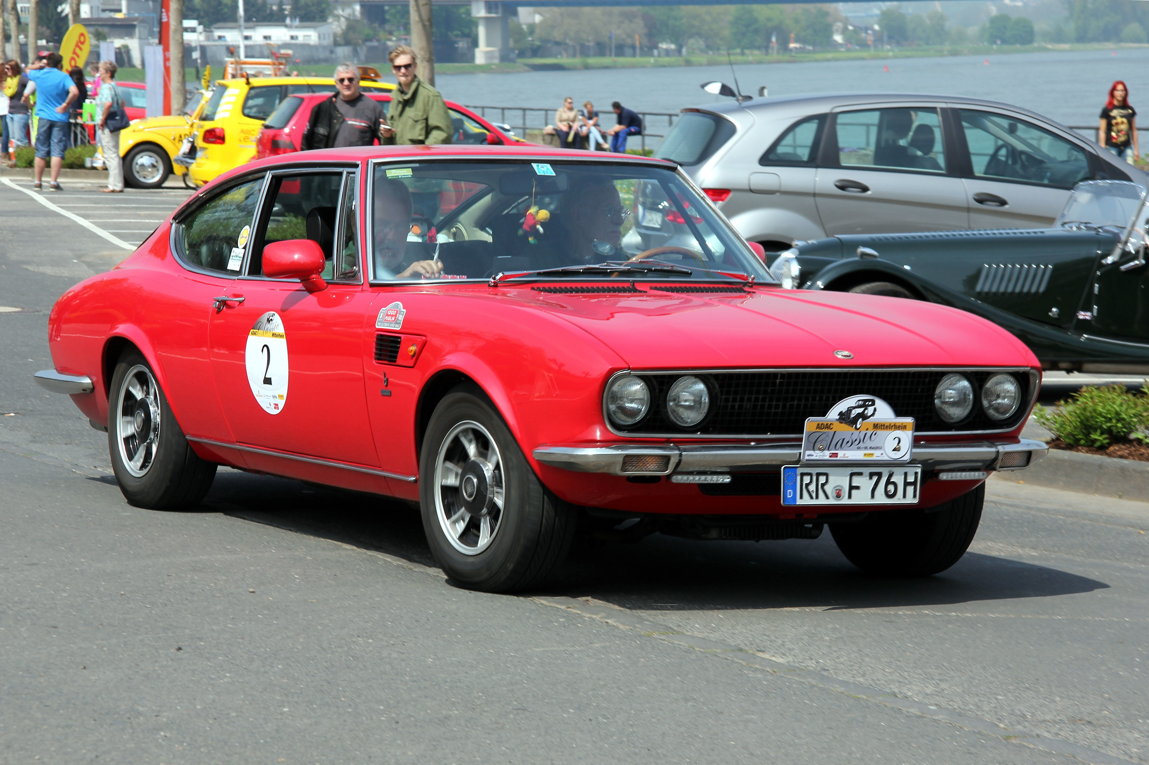 Fiat Dino Coupé 2400, Baujahr 1971. V6-Motor, 2418 cm³, 180 PS bei 6600/min, zwei obenliegende Nockenwellen je Zylinderbank, Einzelradaufhängung (vorn Quer-, hinten Schräglenker), Radstand 2550 mm, Leergewicht 1320 kg, Höchstgeschwindigkeit 205 km/h. Kennzeichen und Startnummer des abgebildeten Fahrzeugs fiktiv.